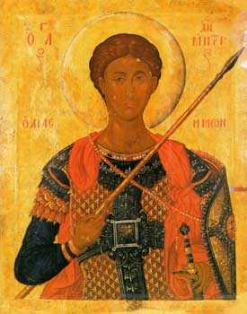 Св. Димитрија Милостив (Добродетел) икона од марковиот манастир